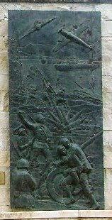 Altare ai Caduti (città di San Cataldo, provincia Caltanissetta)(3).jpg